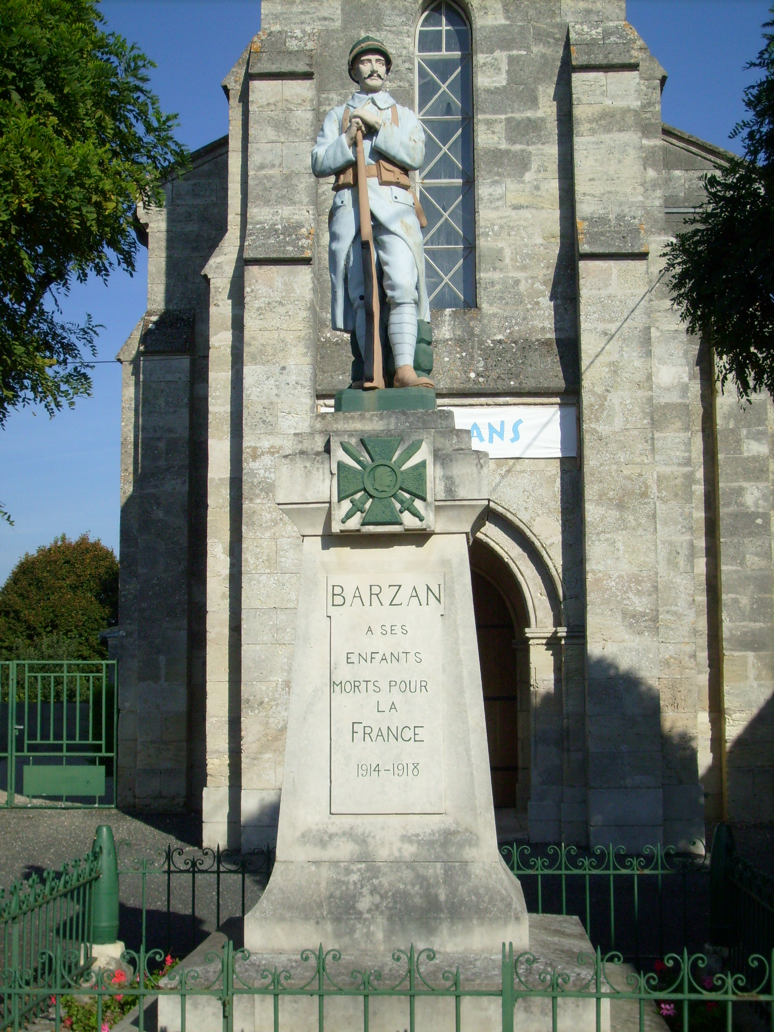 Monument aux morts de Barzan